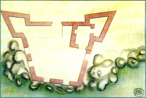 Forte de São Fernando. MACHADO, Francisco Xavier. "Revista dos Fortes e Redutos da Ilha Terceira" (1772). in MARTINS, José Salgado, "Património Edificado da Ilha Terceira: o Passado e o Presente". Separata da "Atlântida", vol. LII, 2007. p. 40.